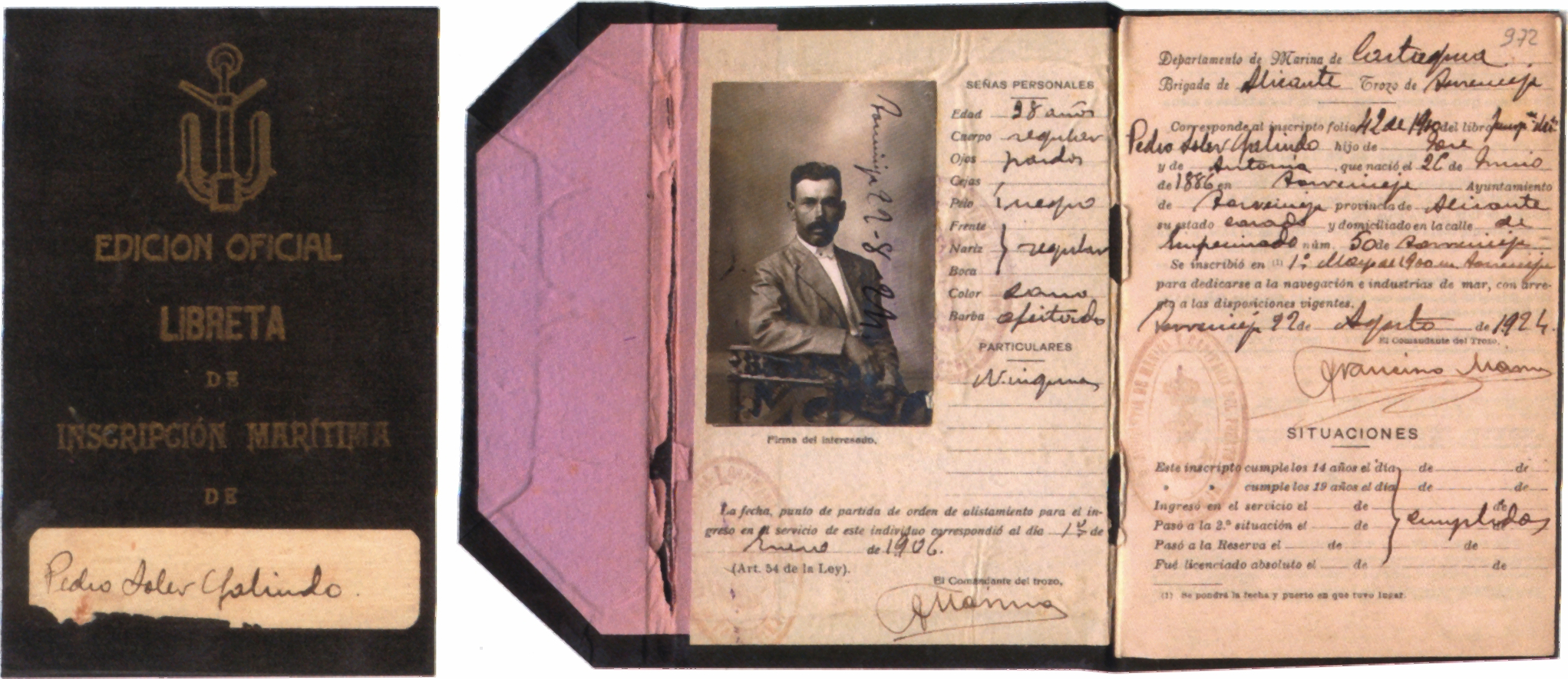 Spanisches Seemannsbuch, 1924.